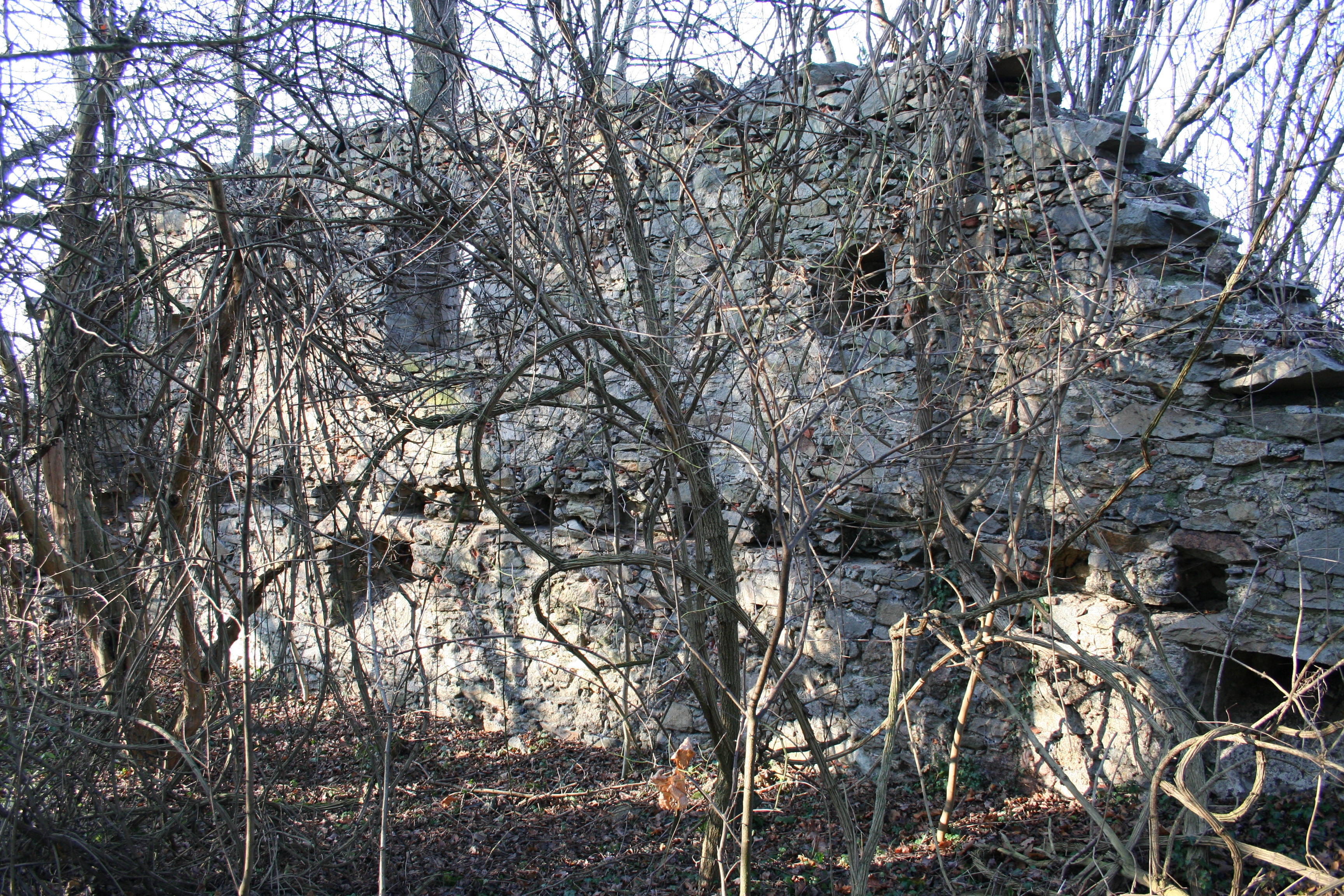 Burgruine Luftenberg, Ringmauer, Innenseite, nördlicher Bereich